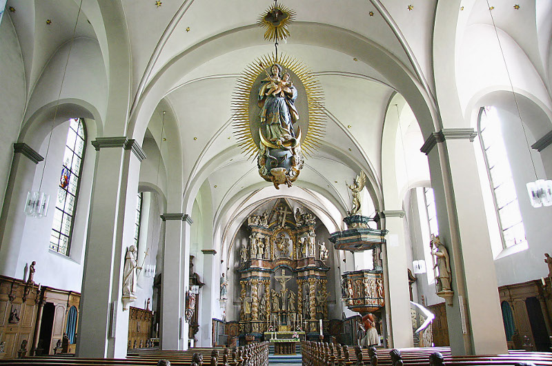 Kirche St. Pankratius Körbecke Bilck auf Hochaltar